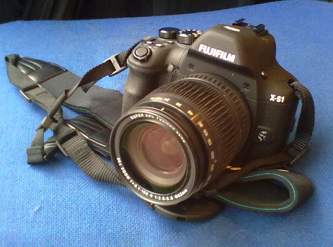 Appareil numérique bridge Fujifilm Finepix X-S1 (commercialisé depuis le début 2012)